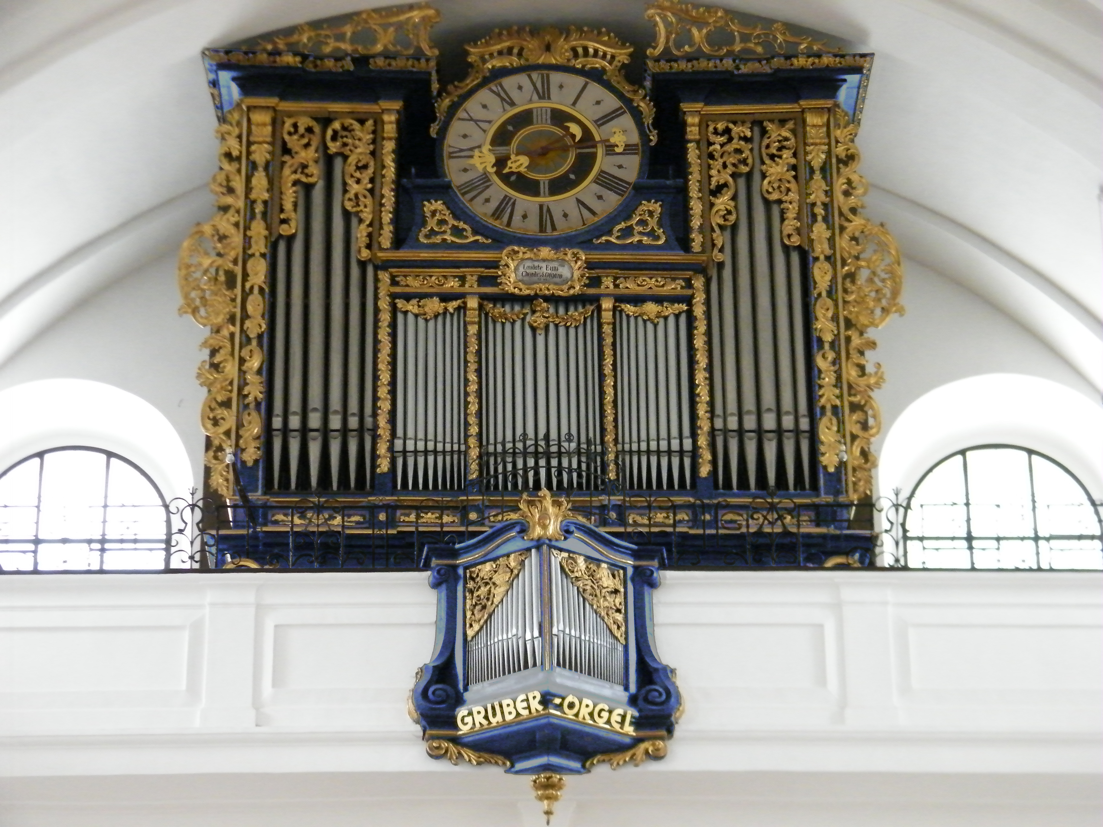 Christoph Egedacher Orgel Hallein 1704 Rekonstruktionsstudie